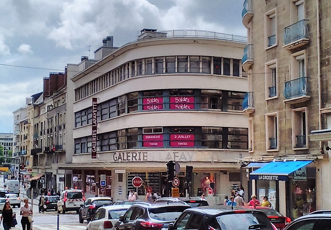 Création de l'architecte Georges Feray en 1953 pour les Nouvelles Galeries, rue du Général-Leclerc, de Rouen.